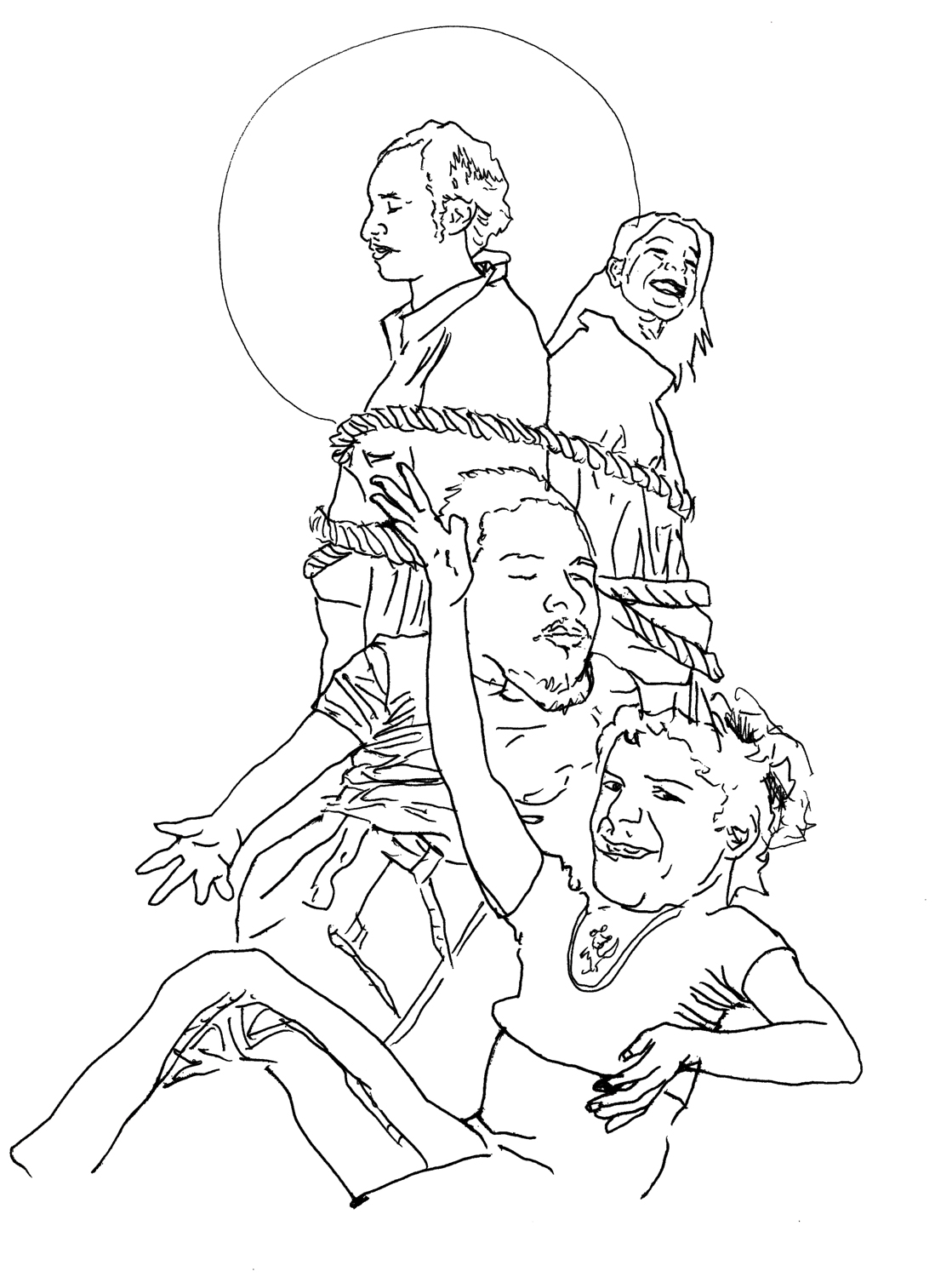 Montaña de caras ATL. Dibujo generado de fotografía. Atlético 1998-2005